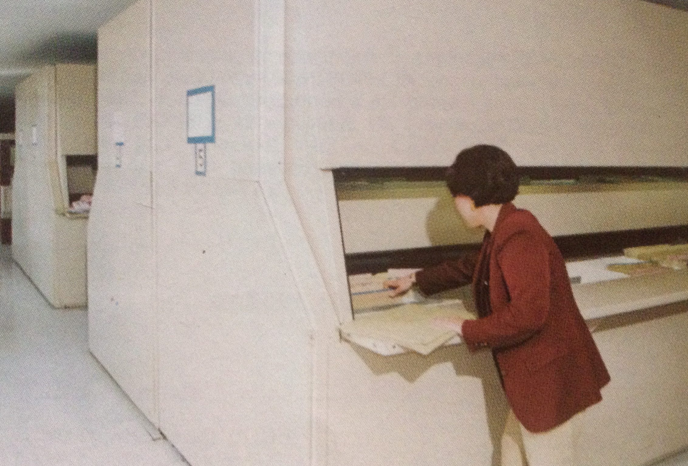 Conservation des hypothèques- Bacs rotatifs informatisés